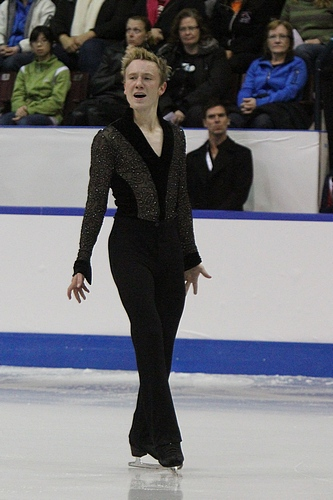 Росс Майнер на 2011 Skate Canada International.